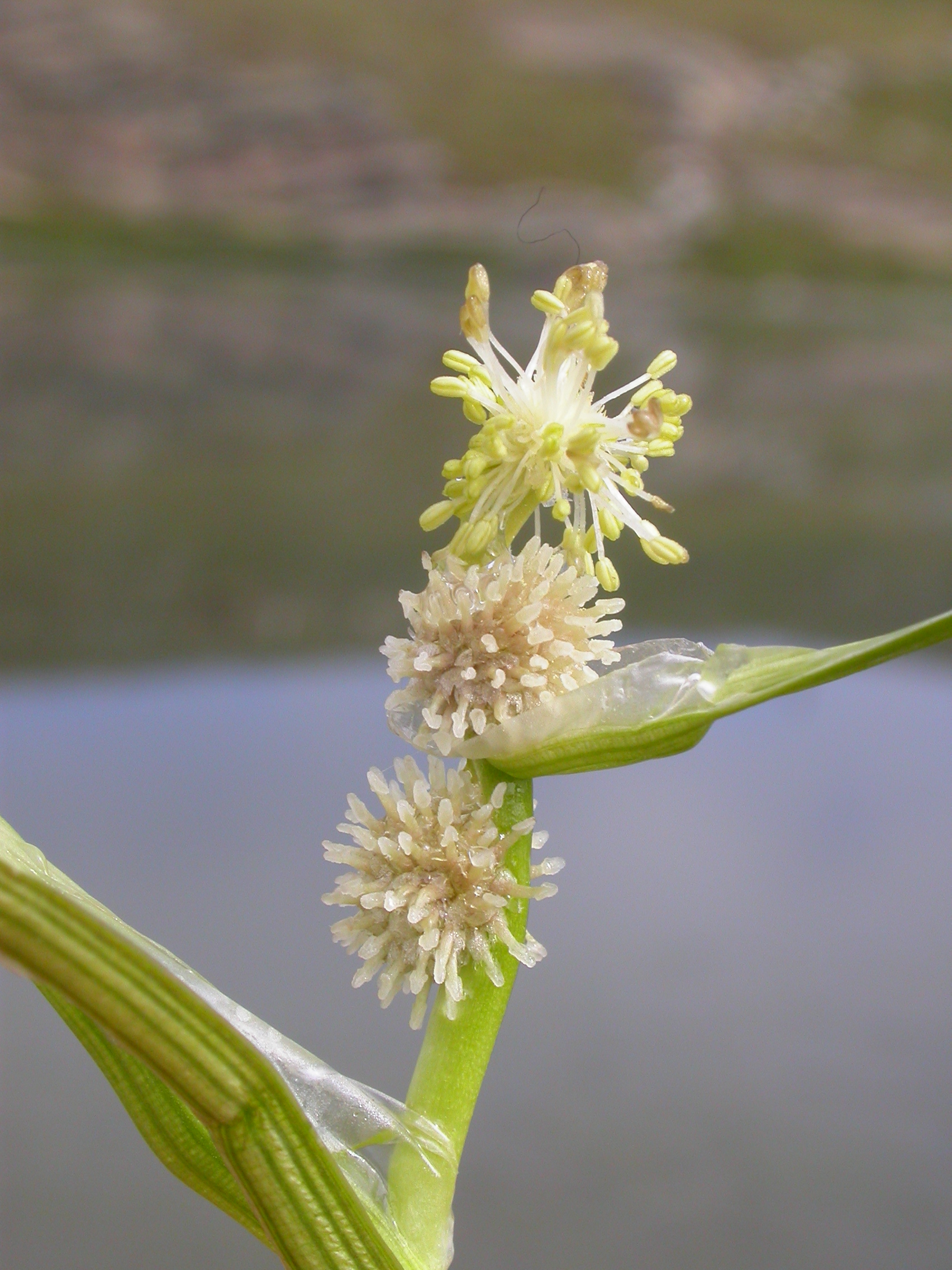 Sparganium angustifolium Zermatt, Riffelberg (Kanton Wallis, Switzerland), 2500 m Author: Barbara Studer – own photograph Date: 2.08.06